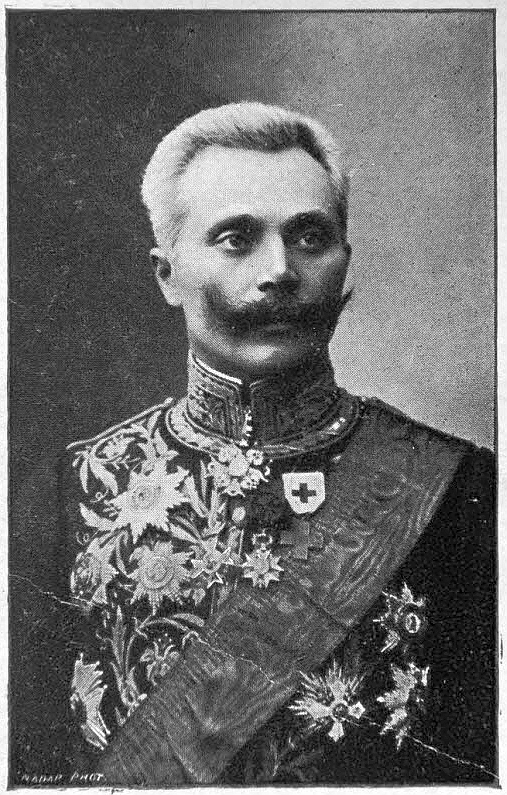 Philippe M(arie) Crozier (1857-1944), 1907-1912 französischer Gesandter (Botschafter) in Wien (Österreich-Ungarn), auf einem Werbekärtchen (Carte réclame) der Schokoladenfima Grondard (Chocolat Grondard)